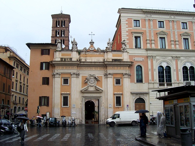 Roma - Chiesa di S. Silvestro in Capite